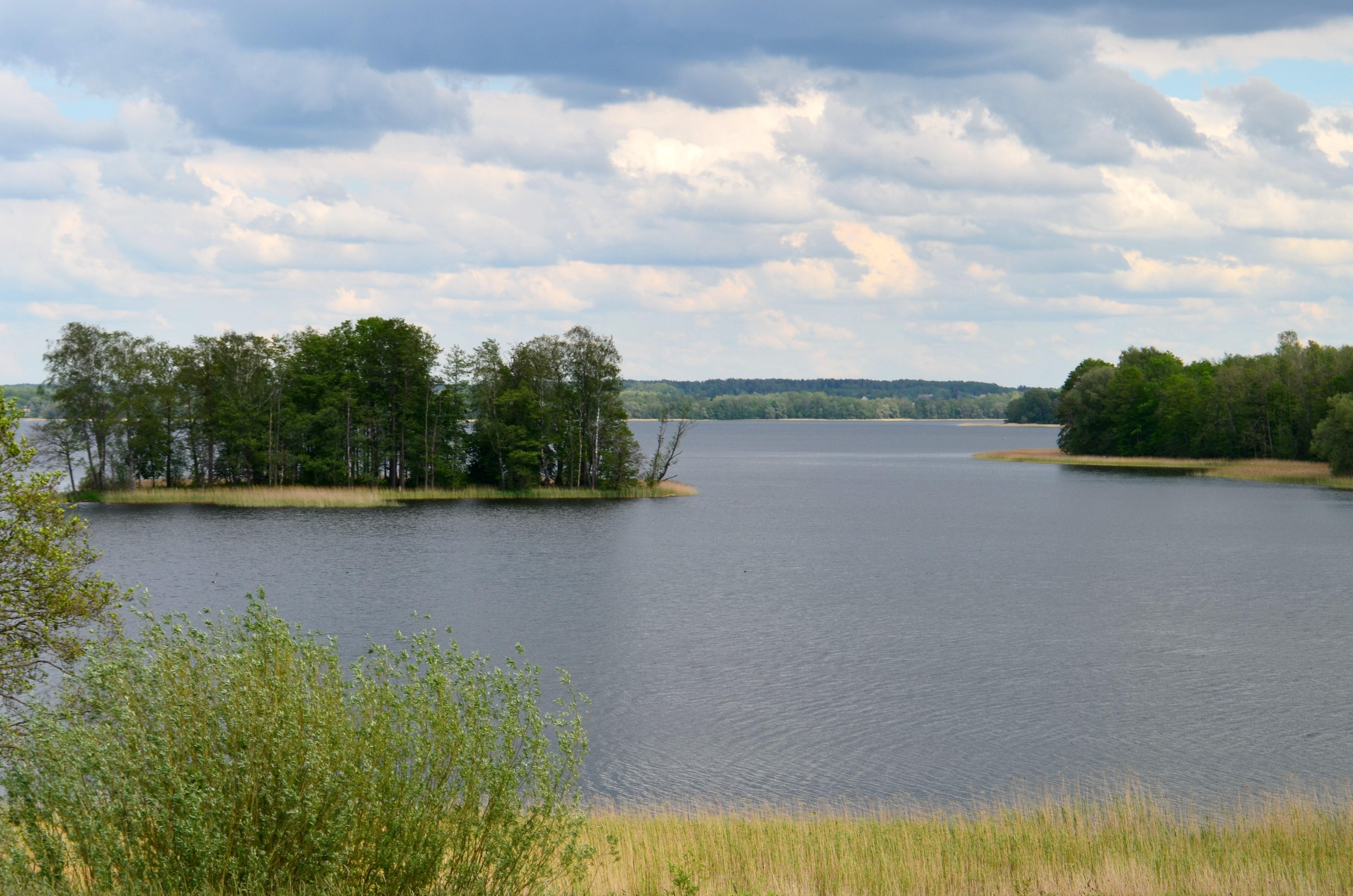 Rubikių ežeras nuo vakarinio kranto, Anykščių raj.